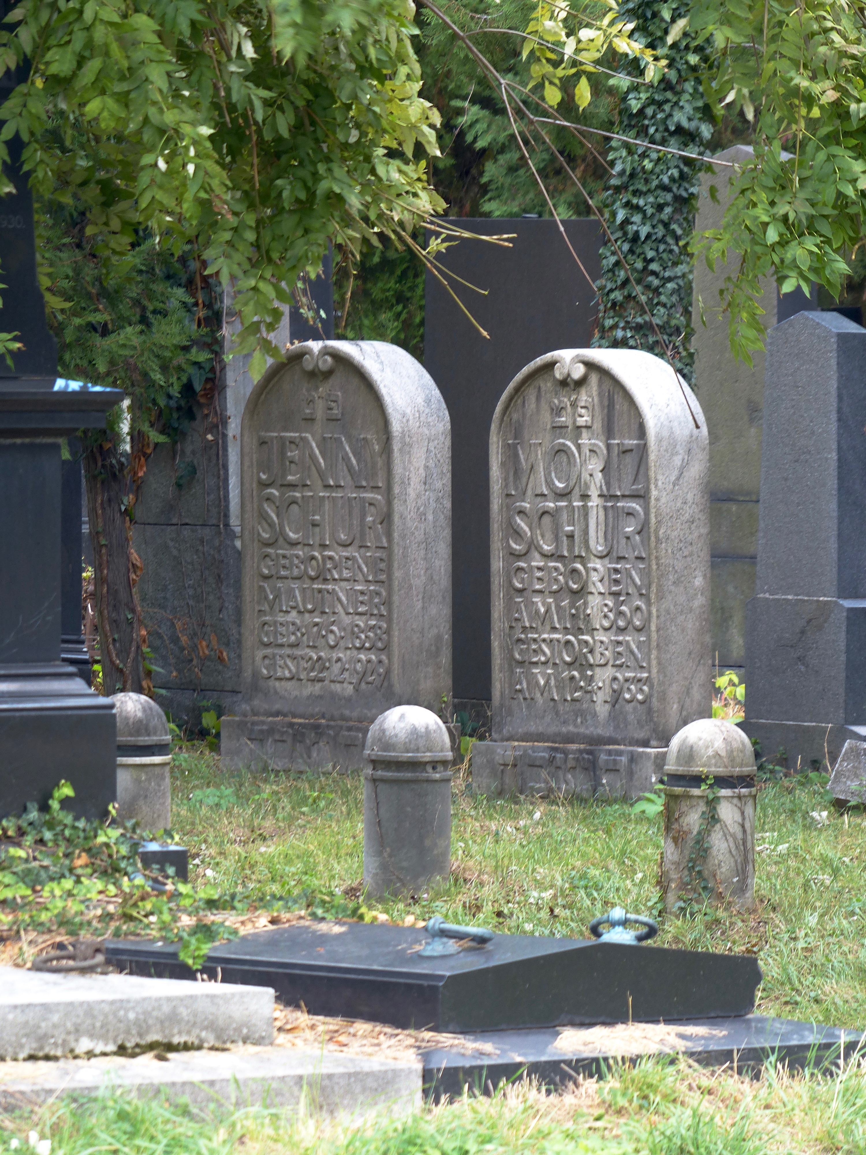 Zentralfriedhof Wien: Alter Israelitischer Friedhof Grabmal Jenny und Moriz Schur